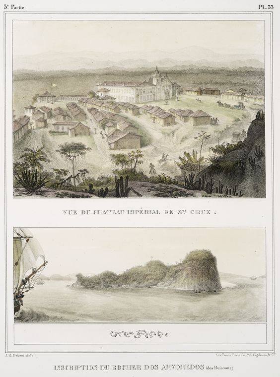 Vue de chateau impérial de Santa-Crux; Inscription du rocher dos Arvoredos (des Buissons). (1834-1839)